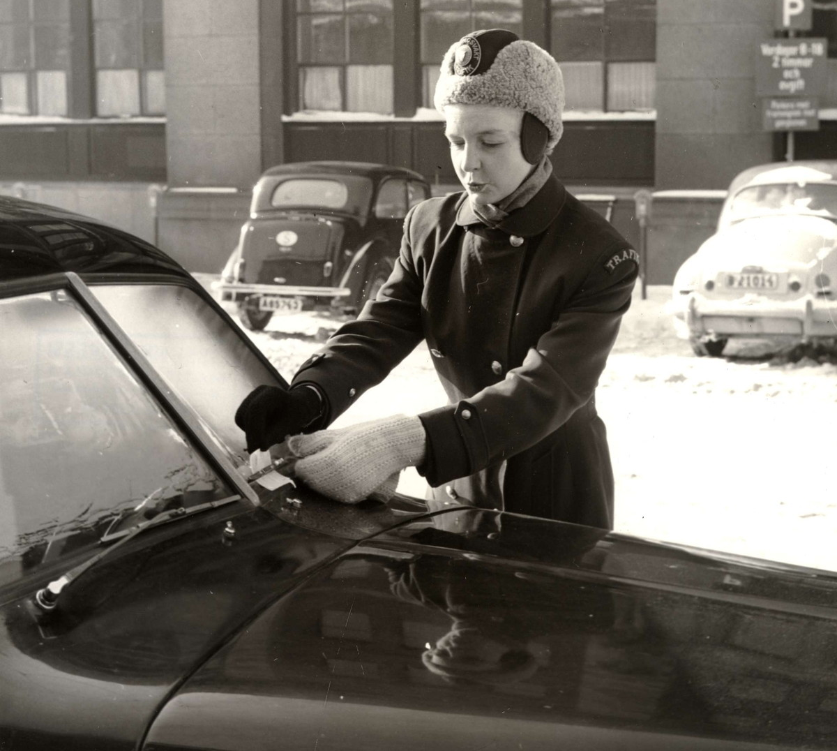 Parkeringsvakt i vinterkläder fäster böteslapp på felparkerad bil.